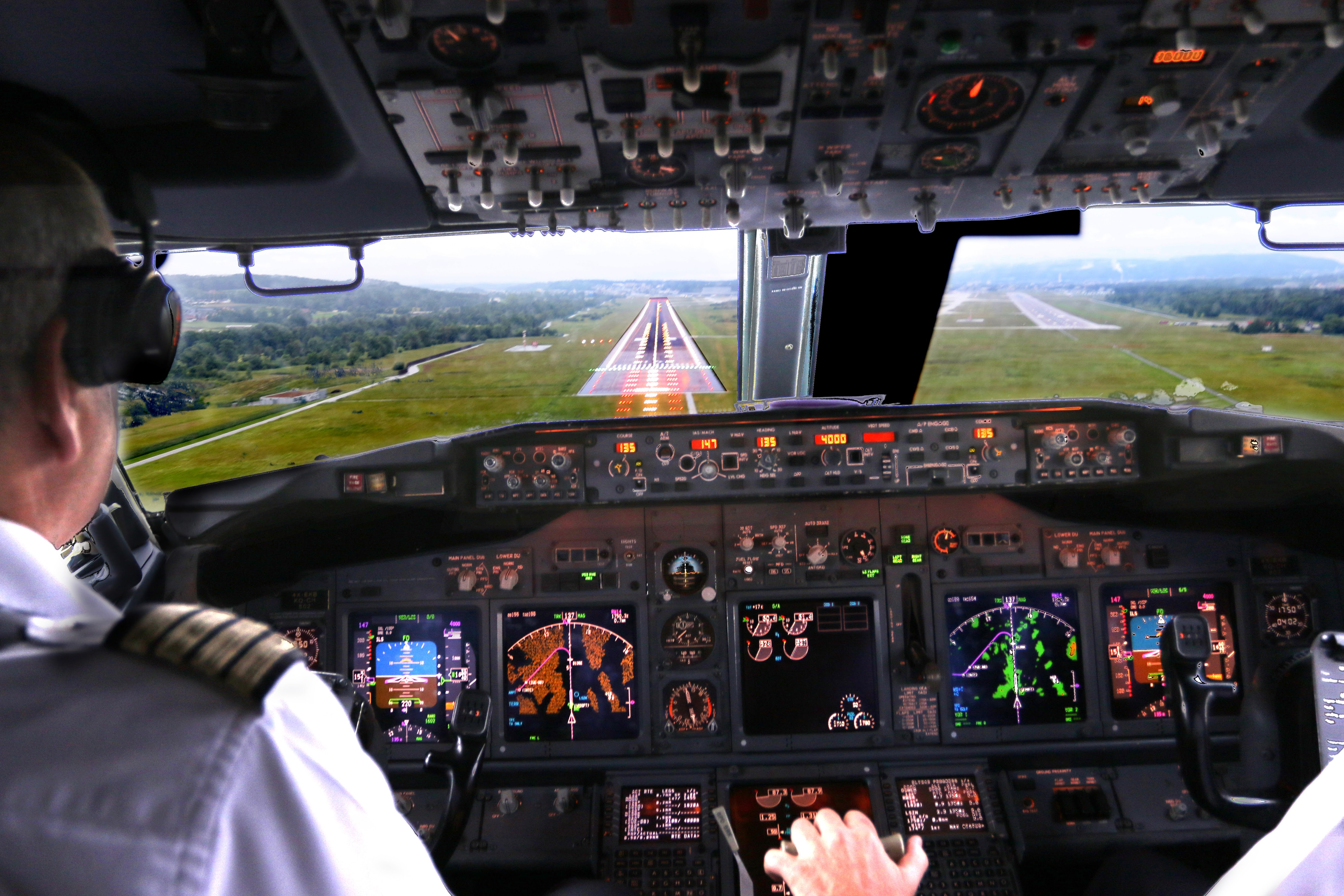 Cockpit pucture, showing approach lights